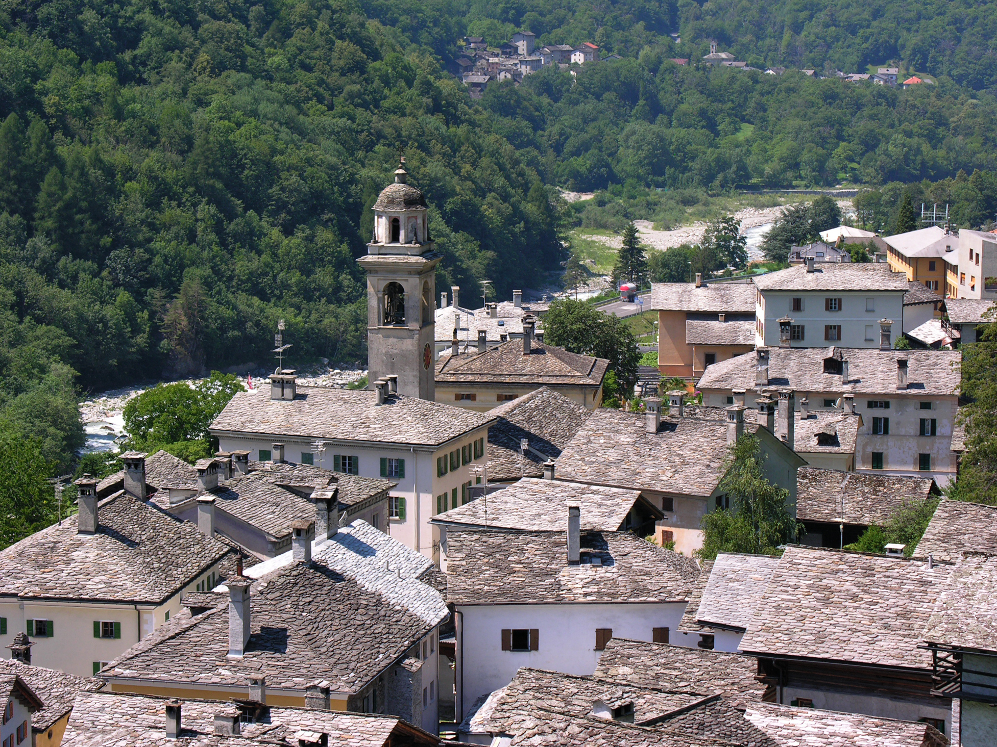 Switzerland, Graubünden, Castasegna